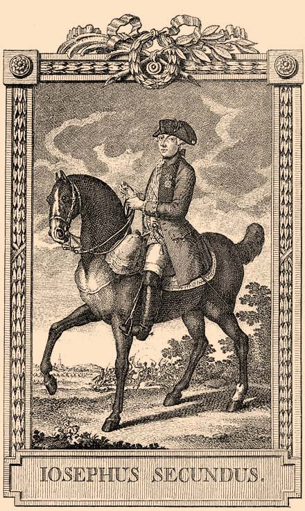 II. József király Mansfeld metszetén